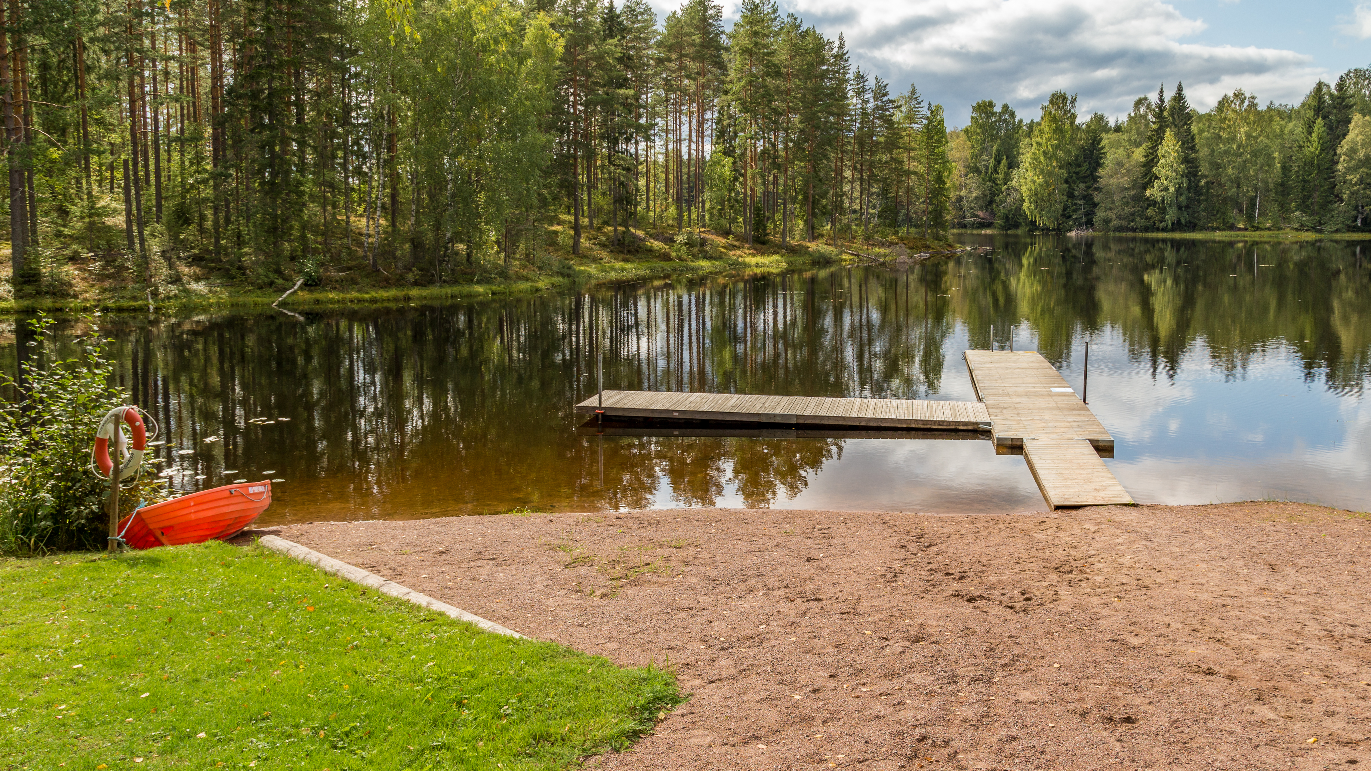 Badplatsen vid Turbodammen, Hedemora kommun, Dalarnas län, Sverige